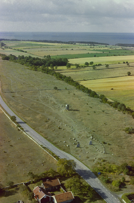 Gettlinge gravfält RAÄnr Södra Möckleby 10:1. Bilden är tagen mot (väderstreck): SV Motiv: Södra Möckleby 10:1 Nyckelord: Flygbilder, Riksintressen, Världsarv Kategori: Gravfält Gettlinge gravfält RAÄnr Södra Möckleby 10:1. Bilden är tagen mot (väderstreck): SV. Södra Möckleby 10:1.